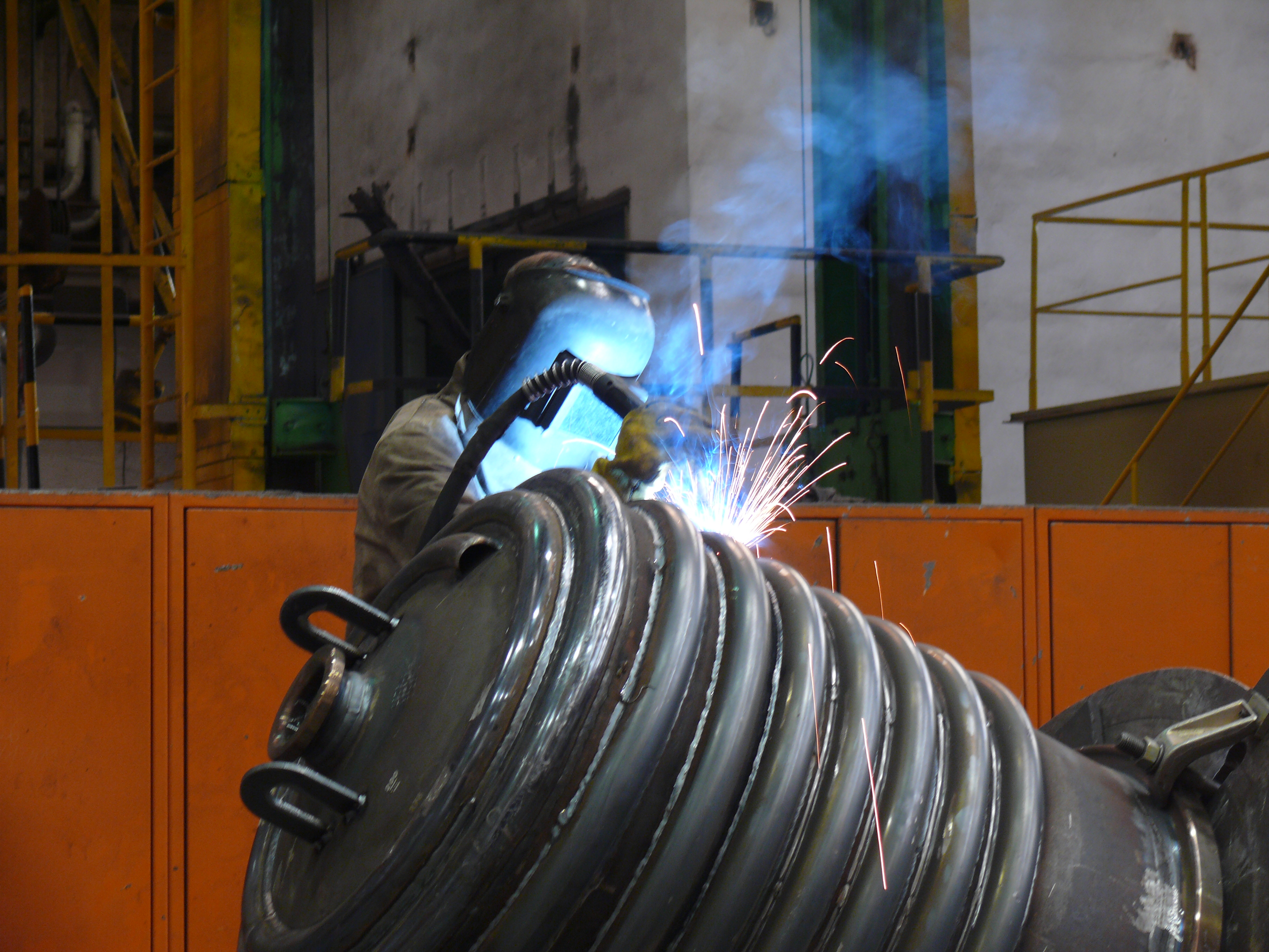 Schweißen eines Behälters mit Halbrohrschlangen